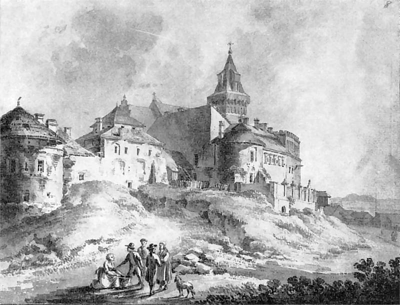 Widok na budynki przy katedrze w Tarnowie od strony ul. Wałowej wykonany przez Z. Vogla ok. 1800 r. Obie widoczne baszty są zachowane.